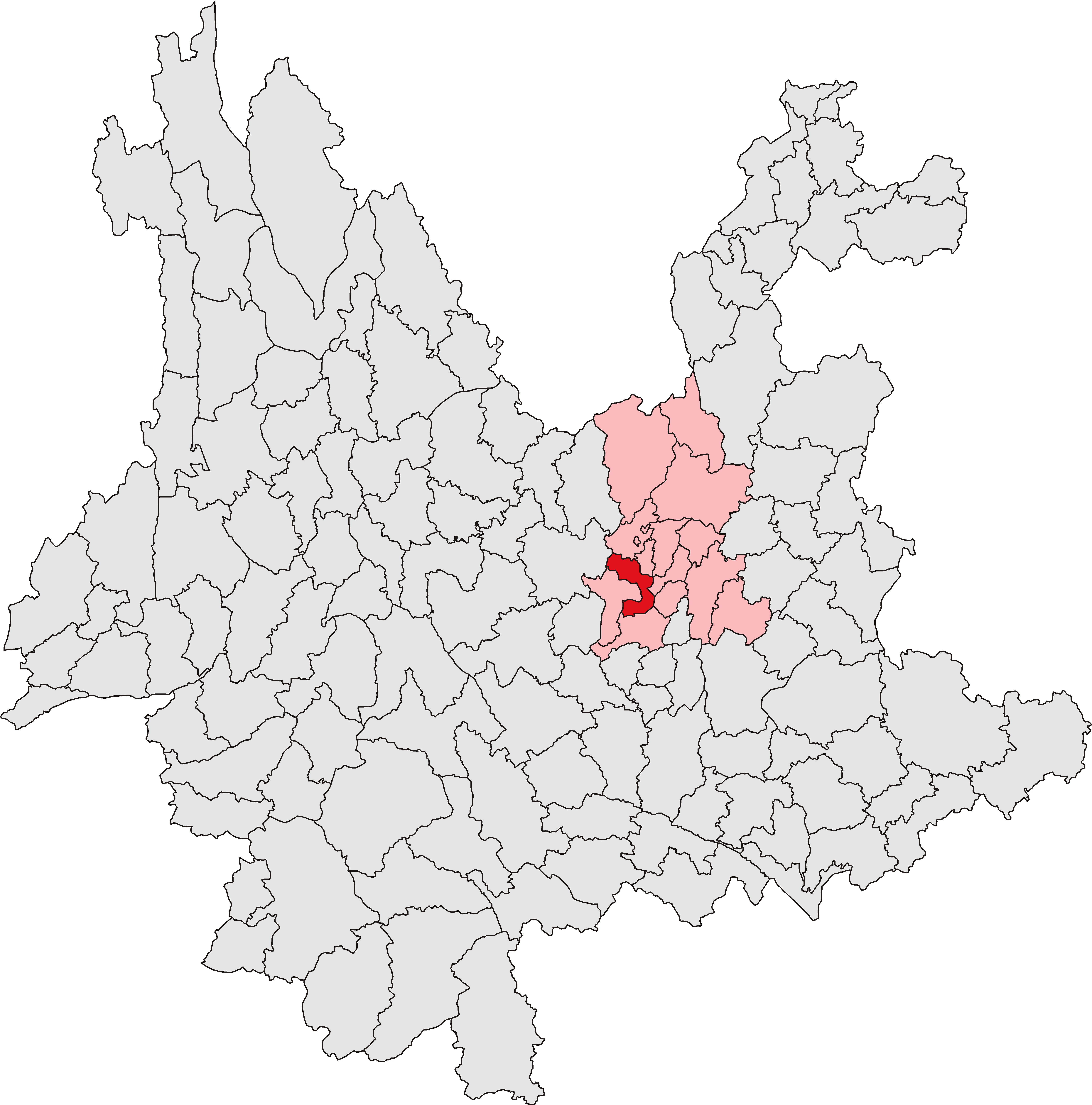 西山区位置图